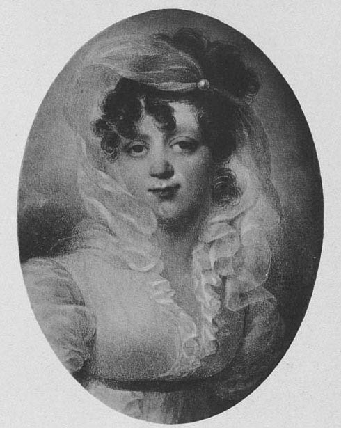 Графиня Мария Дмитриевна Нессельроде (1786-1846), ур. графиня Гурьева, замужем за К.В.Нессельроде (1780-1862).